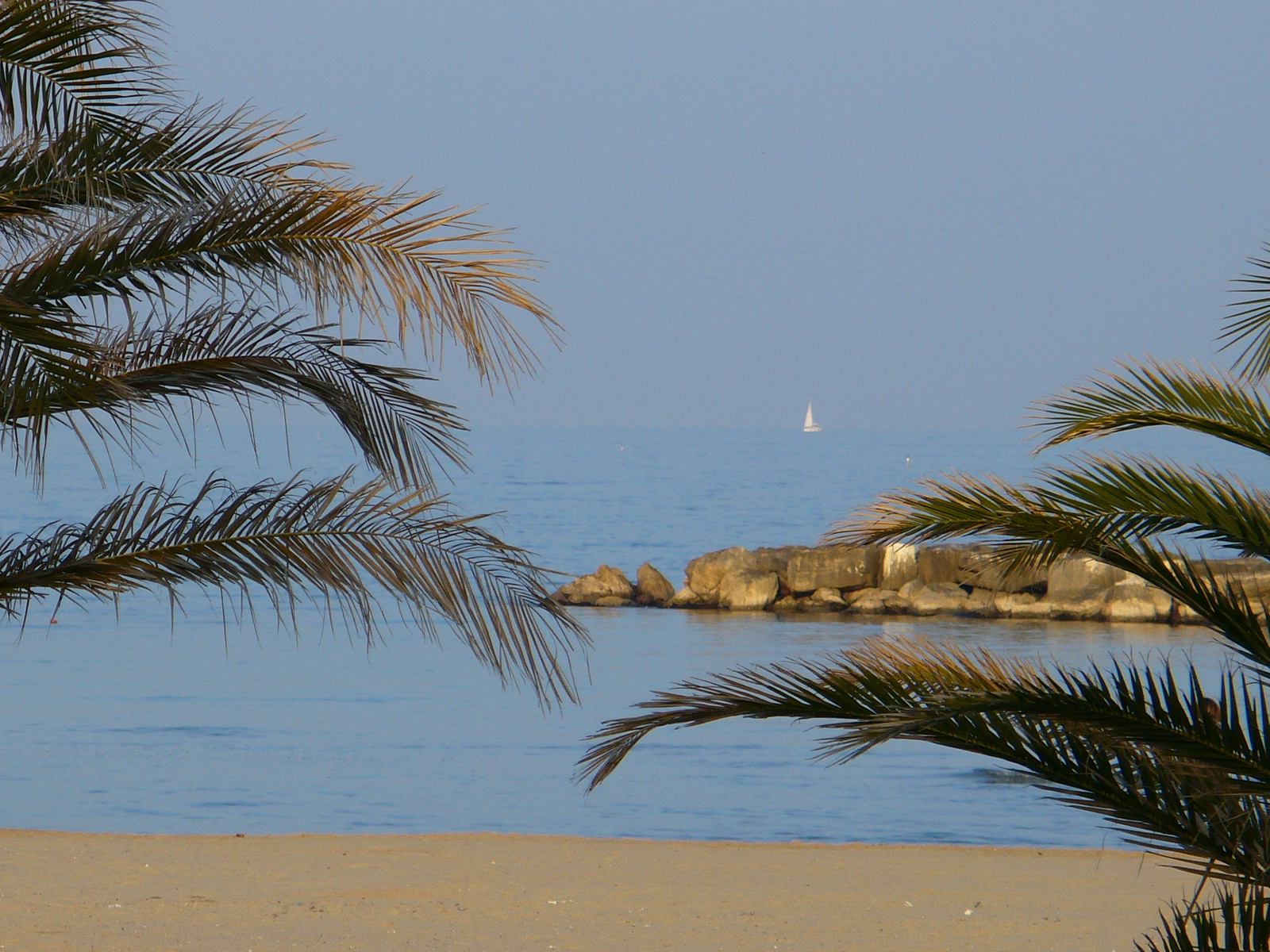 S. Benedetto - Scorcio della spiaggia d'inverno.